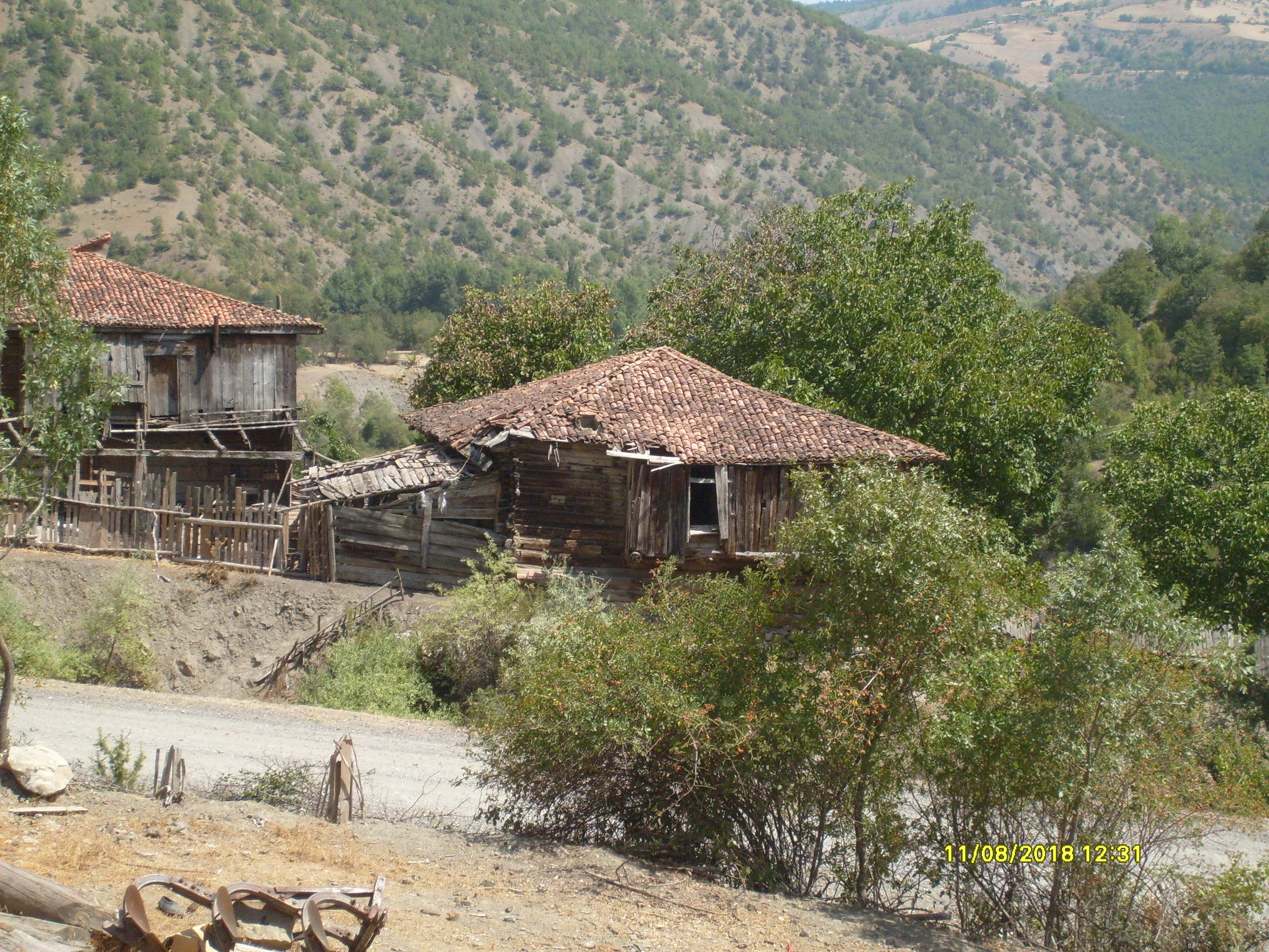 sarıhacı köyü